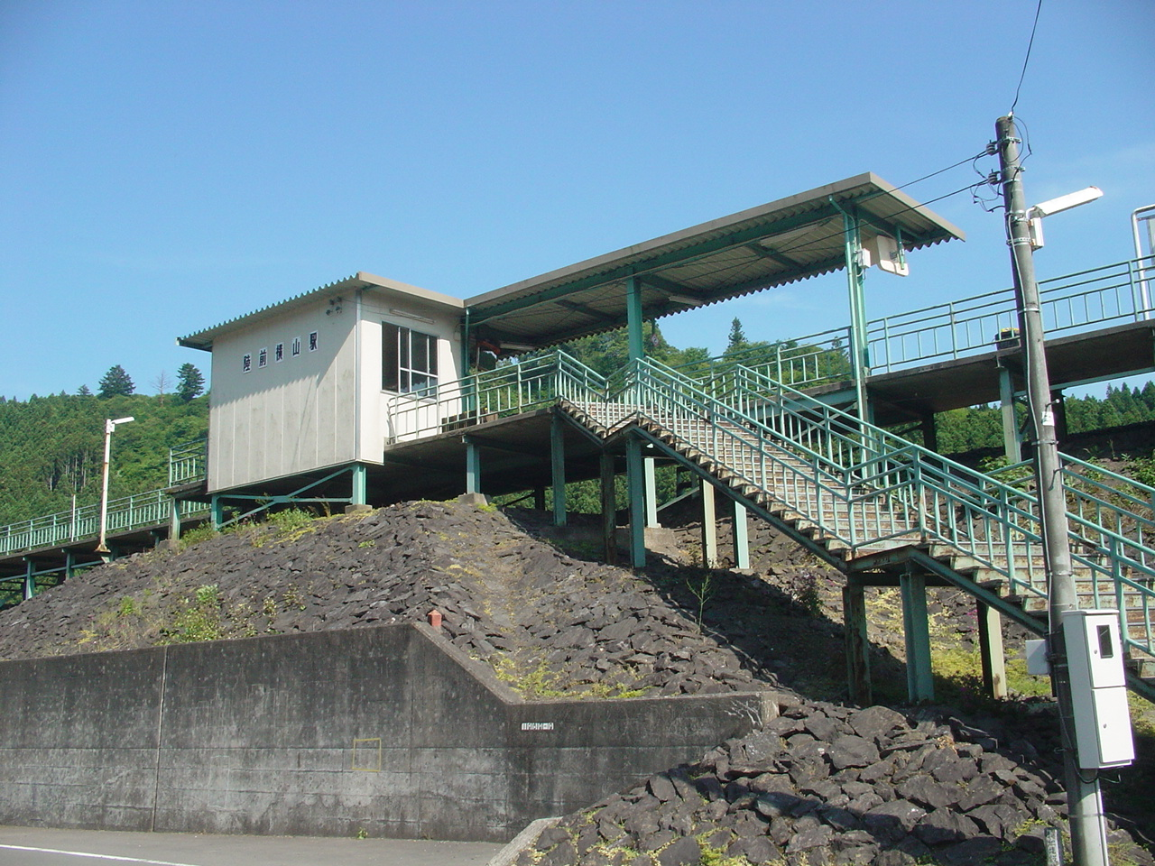 陸前横山駅 （宮城県登米市）